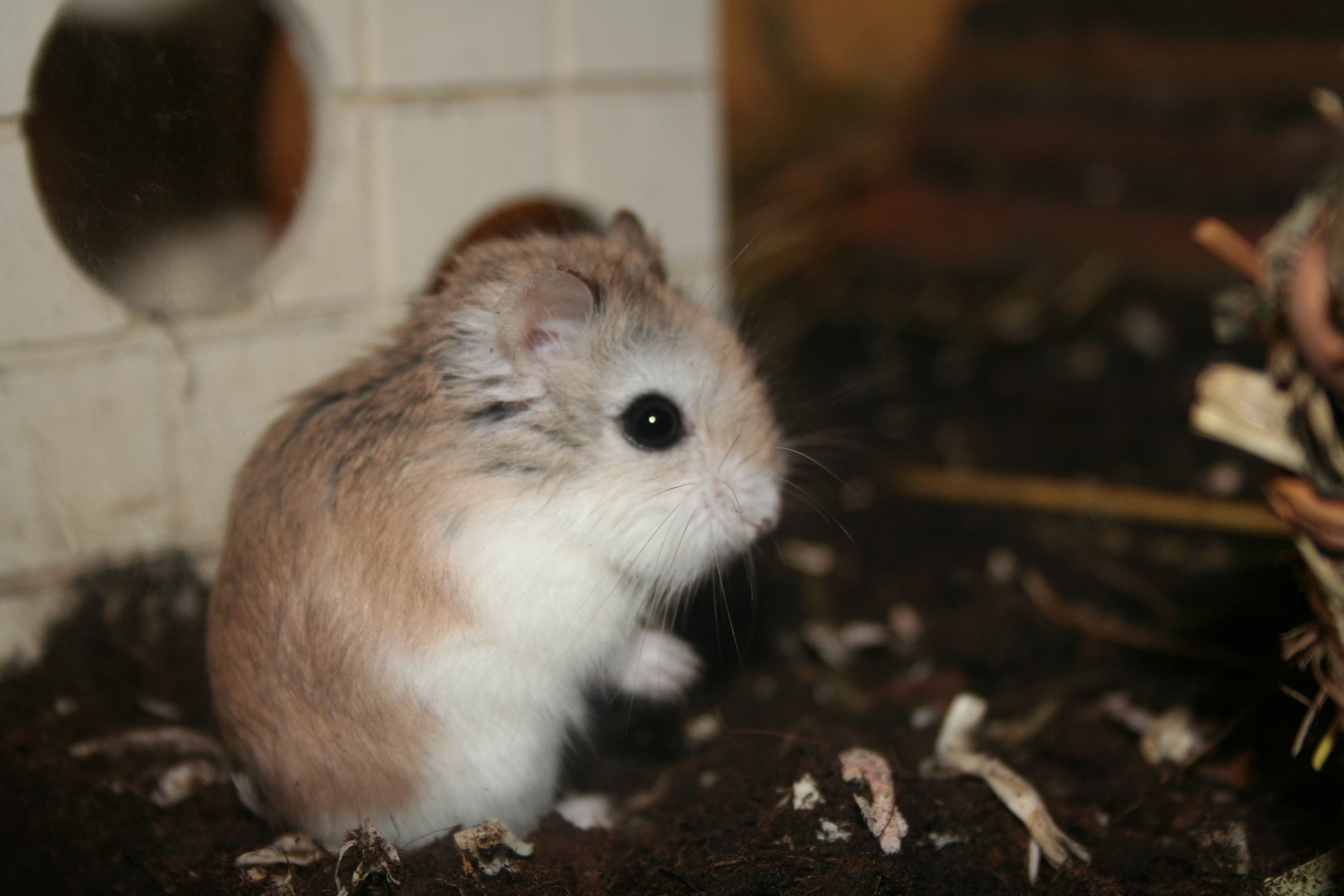 Roborovski Zwerghamster - Nr. 002 Roborovski hamster - No. 002